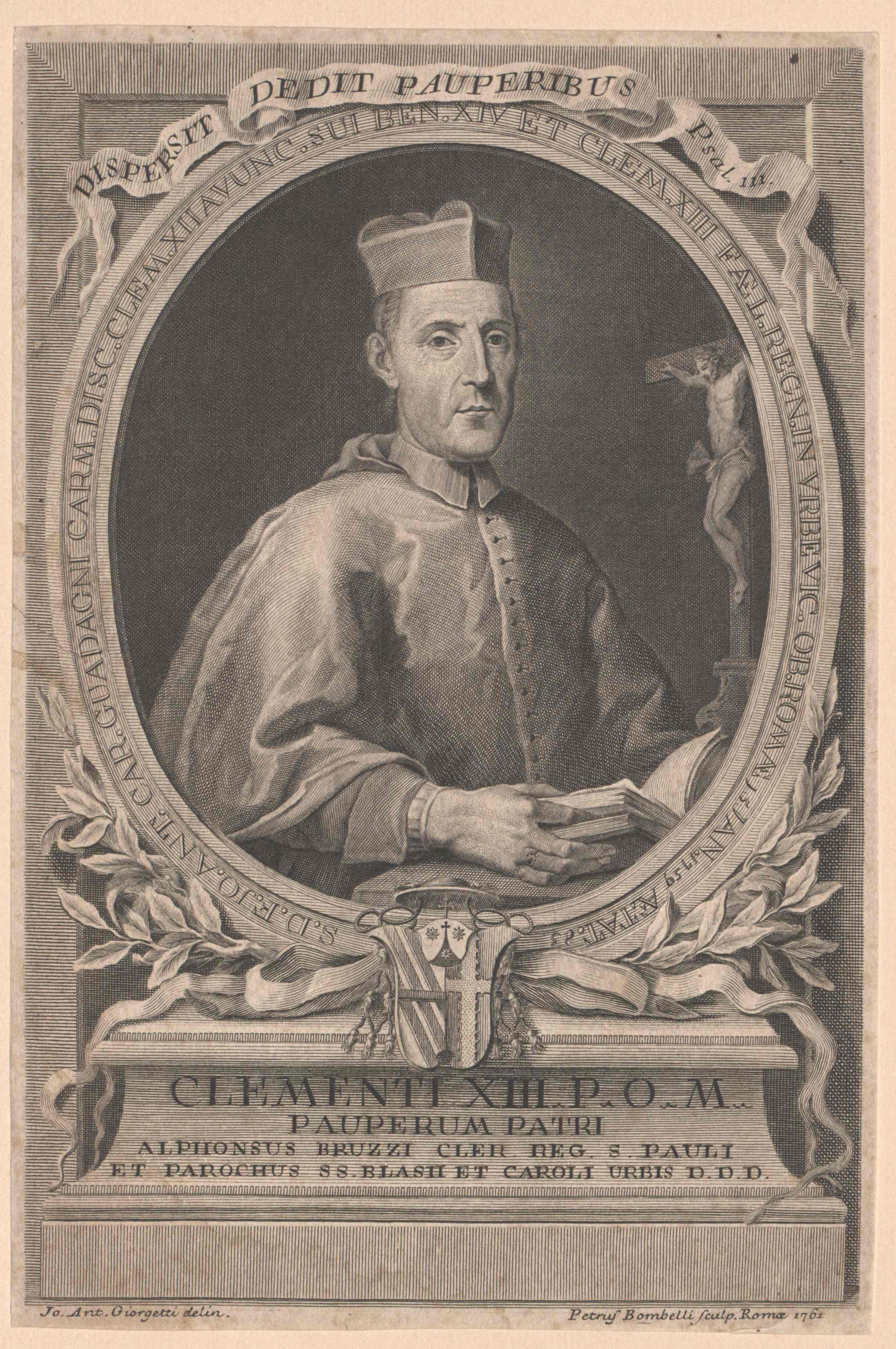 Posthumes Portrait des Kardinals Giovanni Antonio Guadagni († 1759); Wien, Österreichische Nationalbibliothek, Bildarchiv und Grafiksammlung, Porträtsammlung, Inventar-Nr. PORT_00081783_01